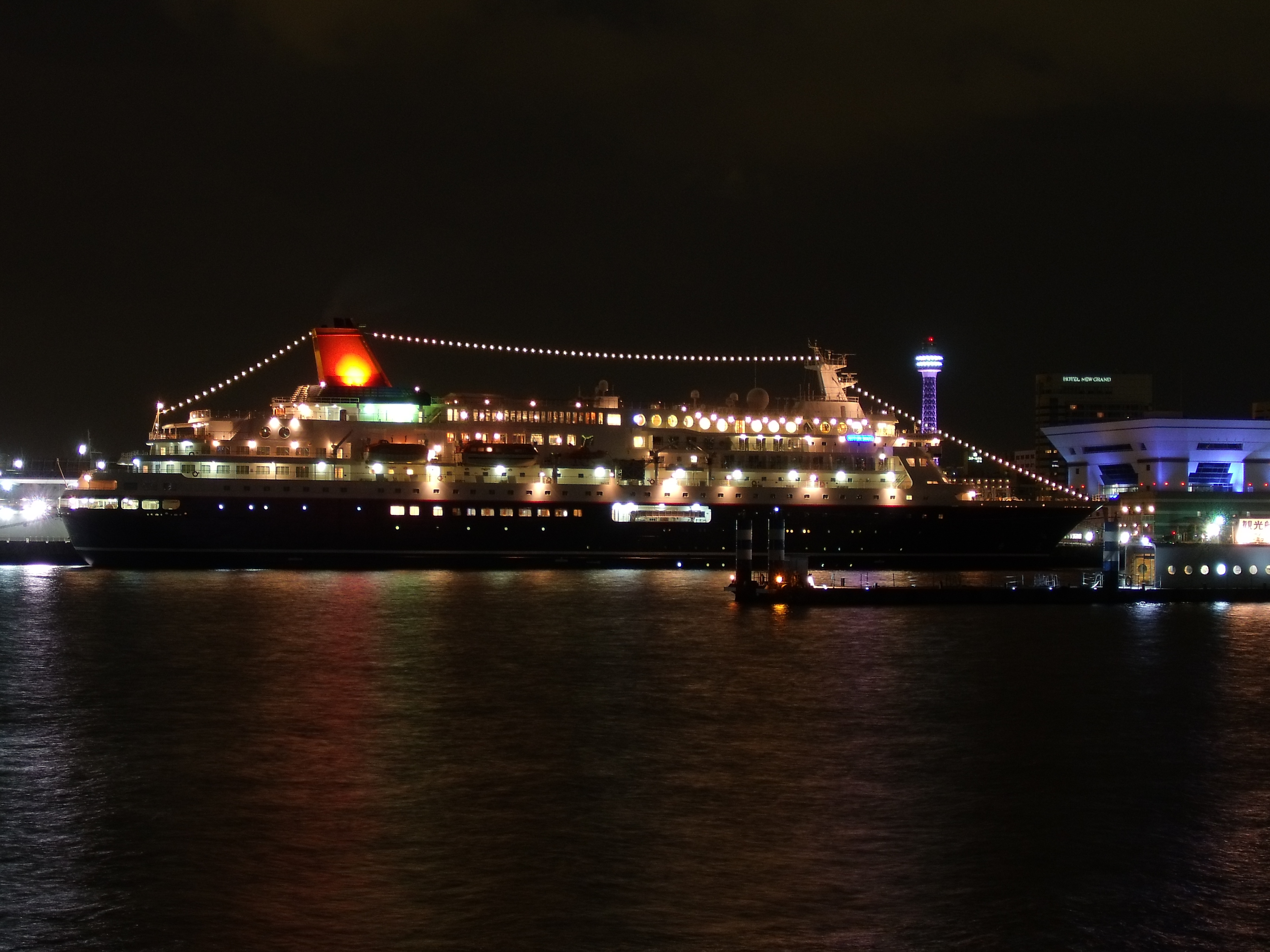 大改装の後の豪華客船にっぽん丸、夜の横浜港大桟橋にて